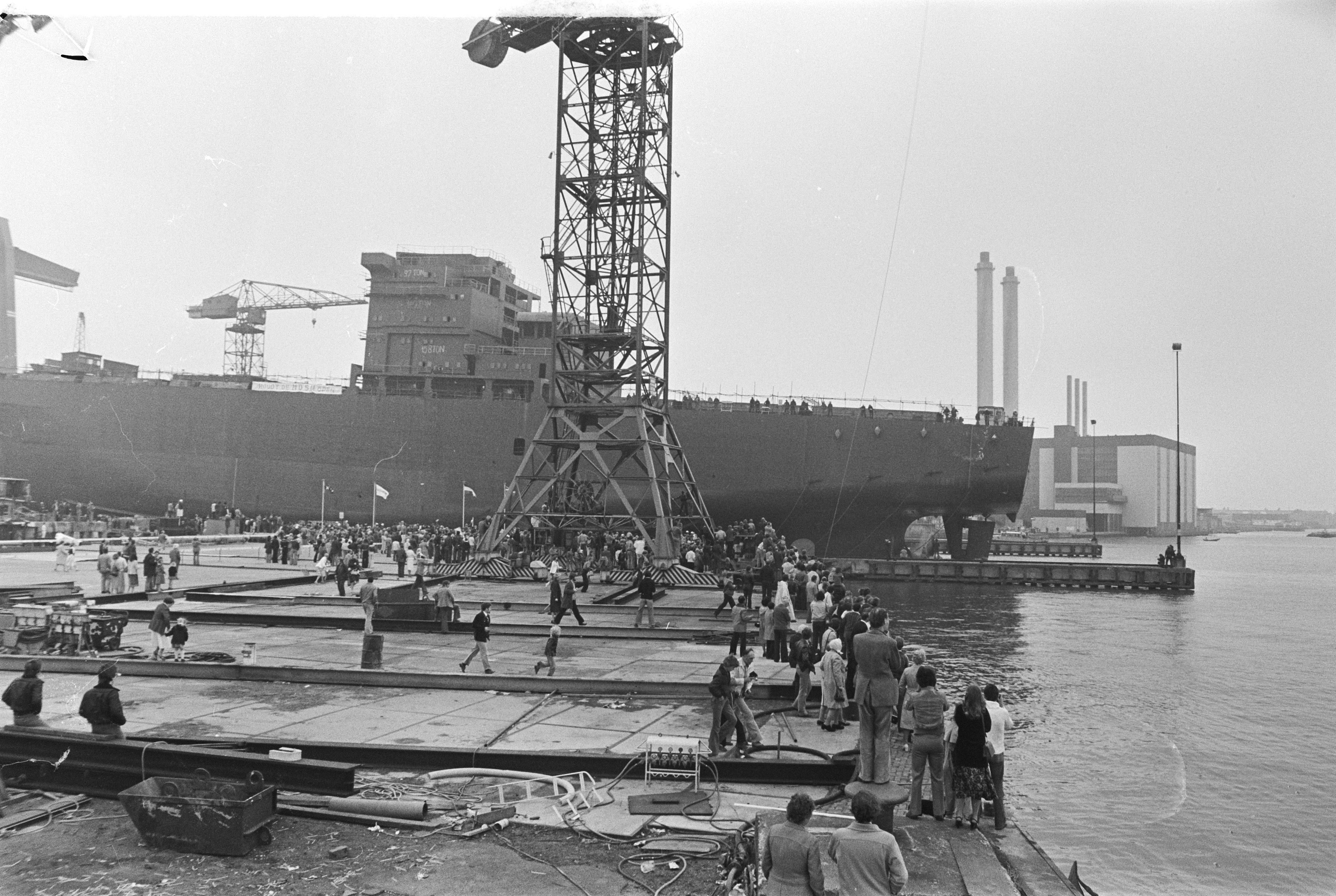 Collectie / Archief : Fotocollectie Anefo Reportage / Serie : [ onbekend ] Beschrijving : Manifestatie op terrein NDSM voor behoud werkgelegenheid, tevens tewaterlating een na laatste schip; een na laatste schip te water Datum : 20 mei 1978 Locatie : Amsterdam Trefwoorden : betogingen, scheepsbouw Instellingsnaam : NDSM Fotograaf : Bogaerts, Rob / Anefo Auteursrechthebbende : Nationaal Archief Materiaalsoort : Negatief (zwart/wit) Nummer archiefinventaris : bekijk toegang 2.24.01.05 Bestanddeelnummer : 929-7283